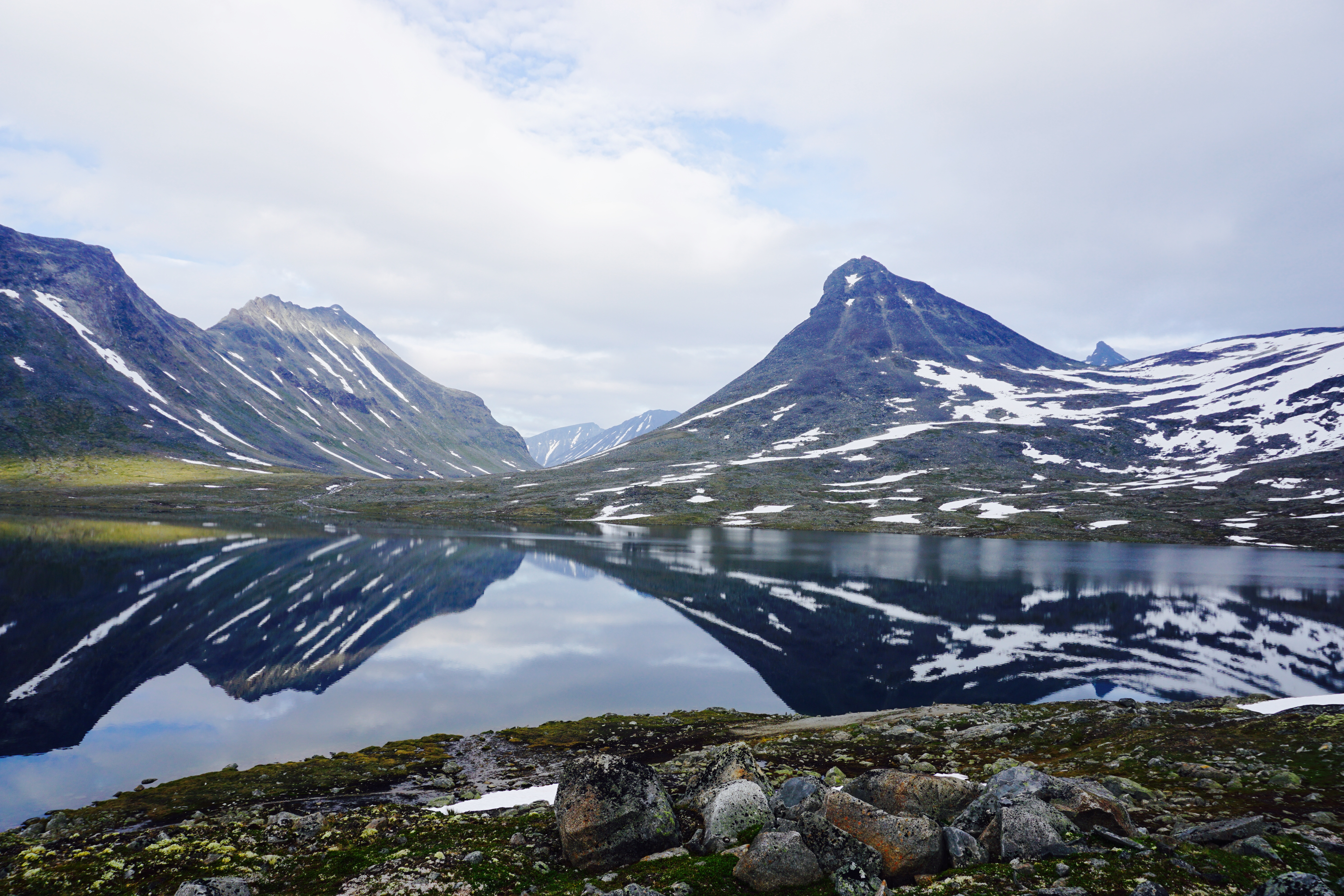 Bilde av Kyrkja 2032